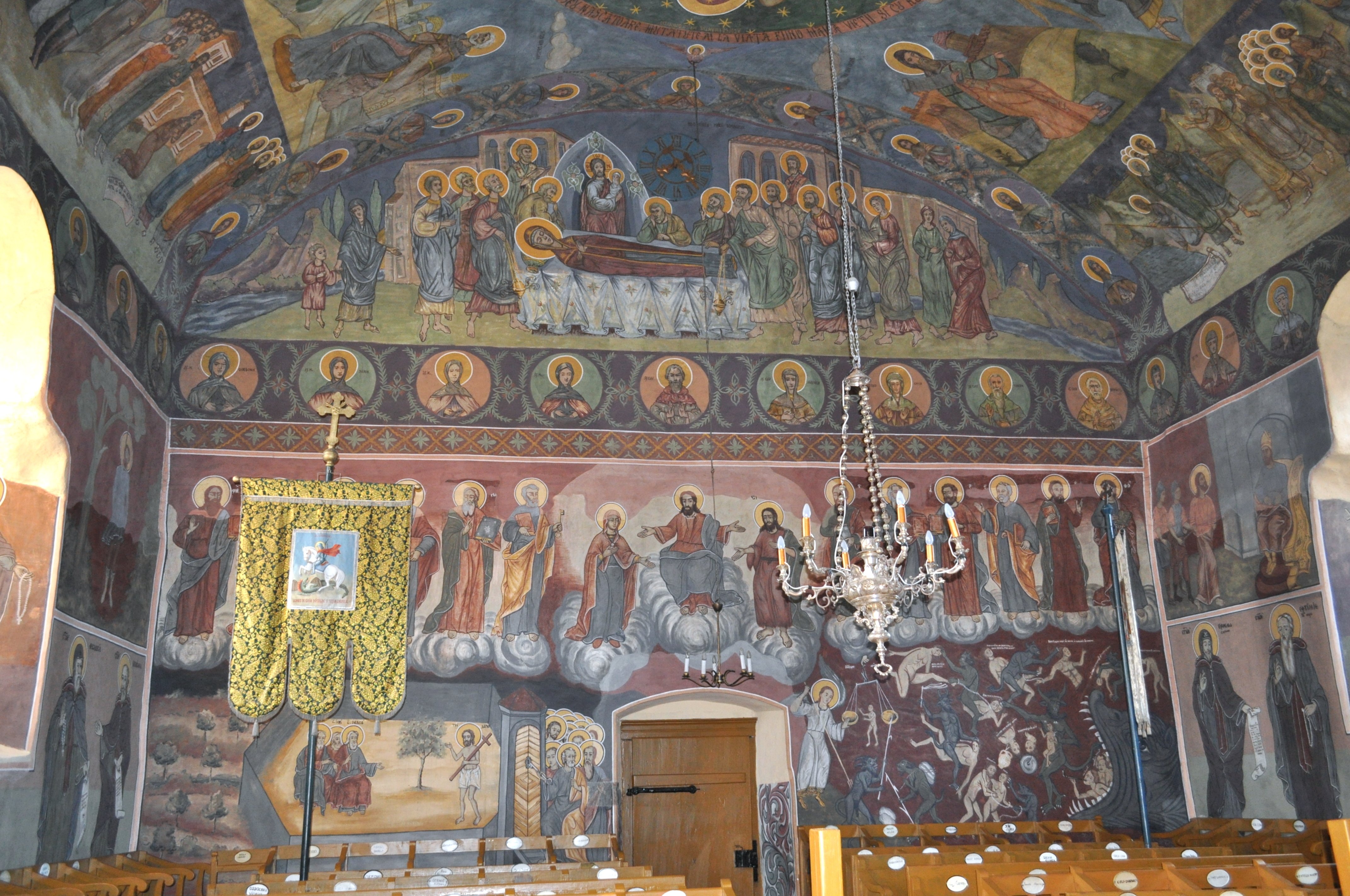 Biserica „Nașterea Născătoarei de Dumnezeu" din Hălmagiu, județul Arad